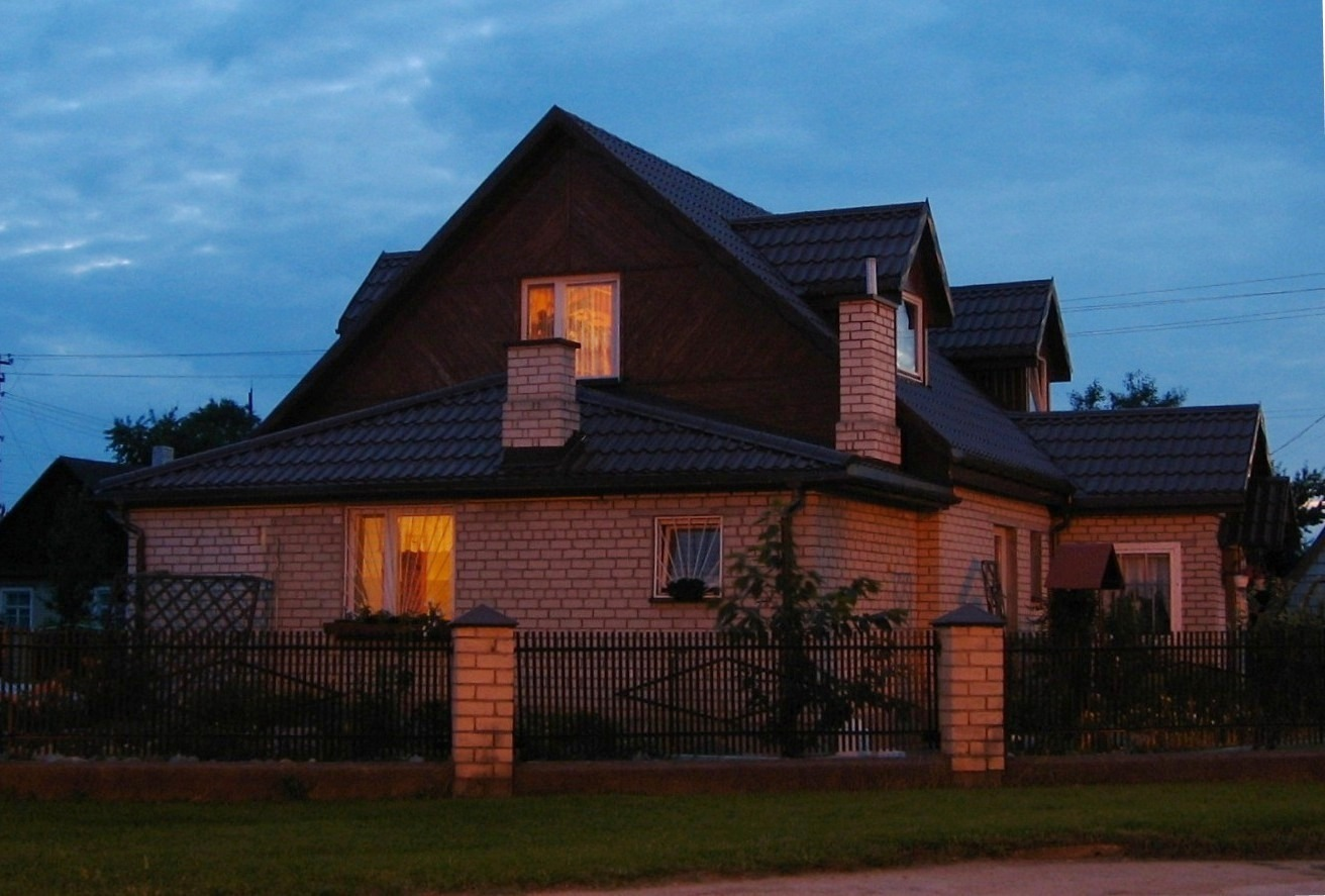 Woronowo, Belarus